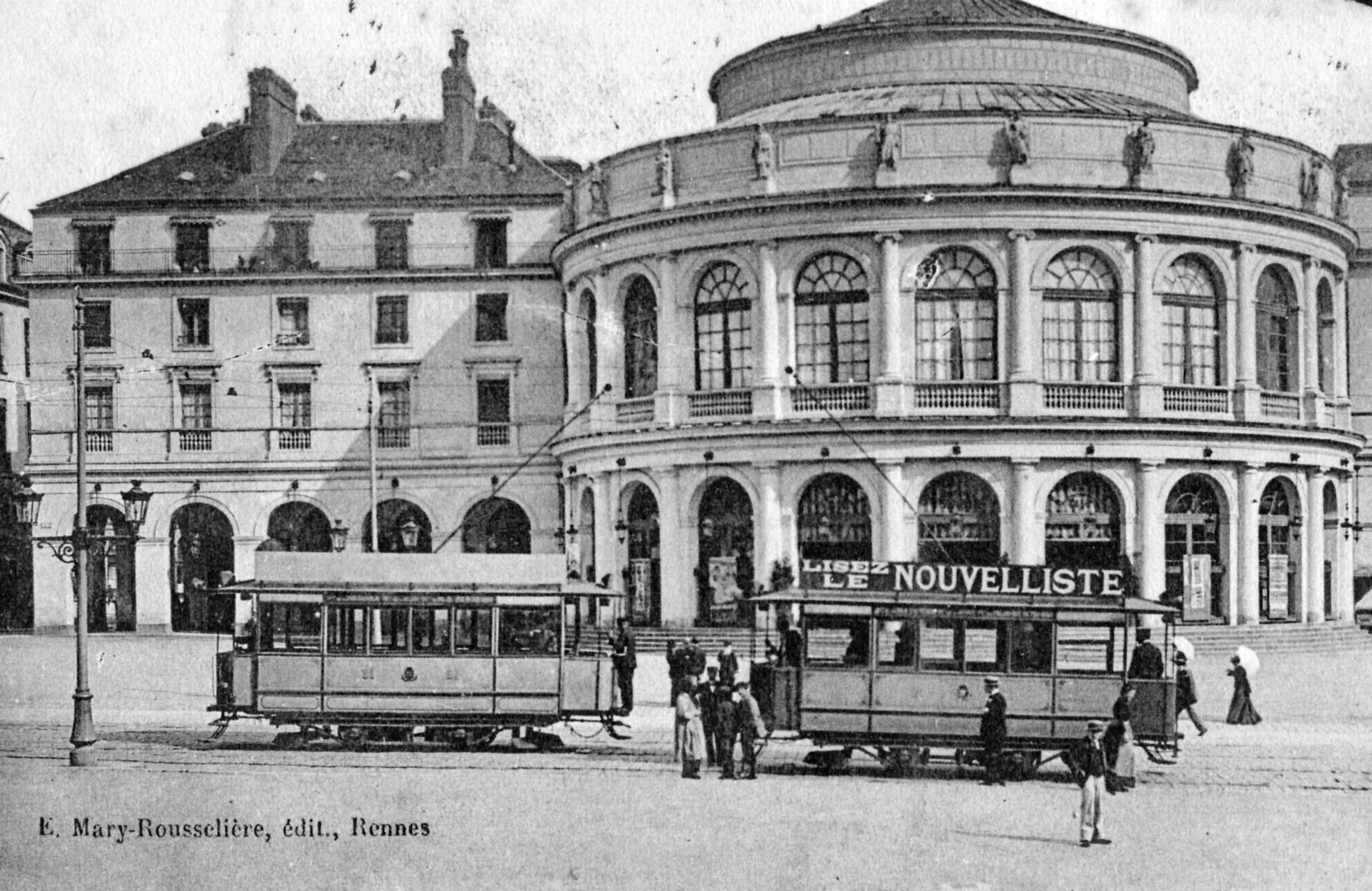 Détail de la carte postale ancienne éditée par Mary-Rousselière à Rennes, n°1022RENNES - Le ThéatreGros plan sur le croisement de deux motrices du tramway de Rennes